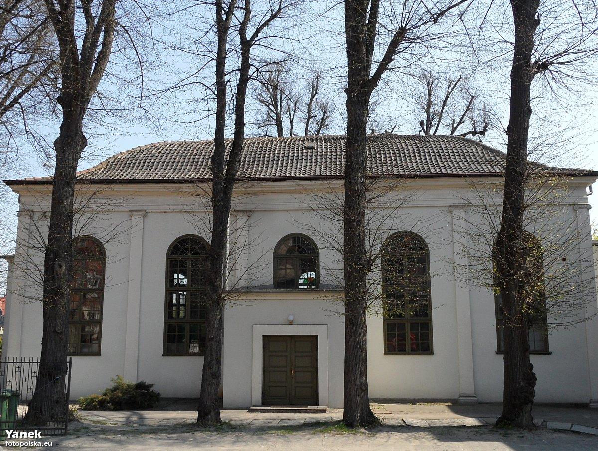 Gdańsk Biskupia Górka, ul. Mennonitów 2a. - dawny kościół mennonitów, obecnie Zjednoczony Kościół Ewangelicki, 1818 (od dziedzińca wewnętrznego, od zachodu)